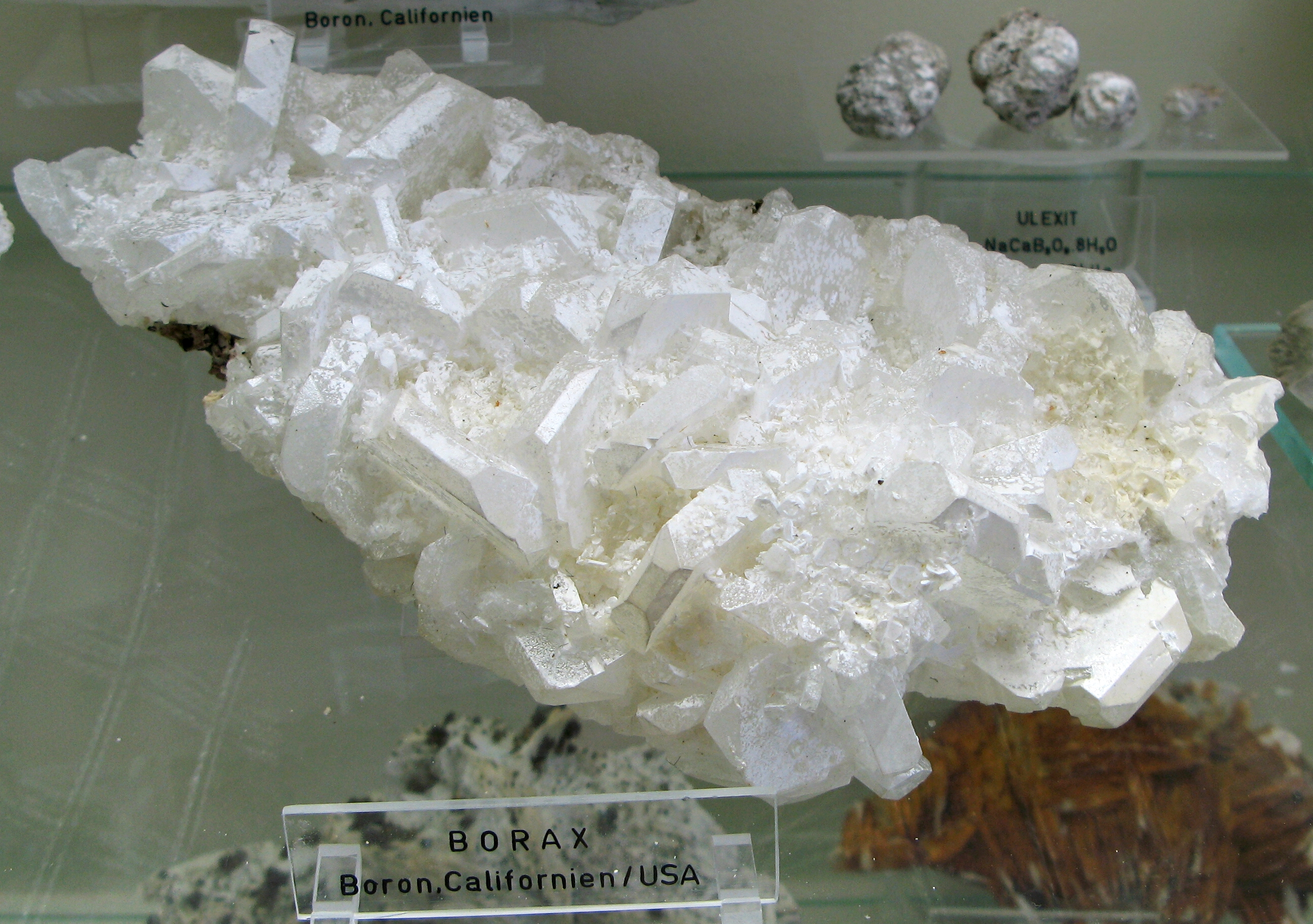 Borax (teilweise durchscheinend) - Fundort: Boron, Californien, USA - Ausgestellt im Mineralogischen Museum Bonn